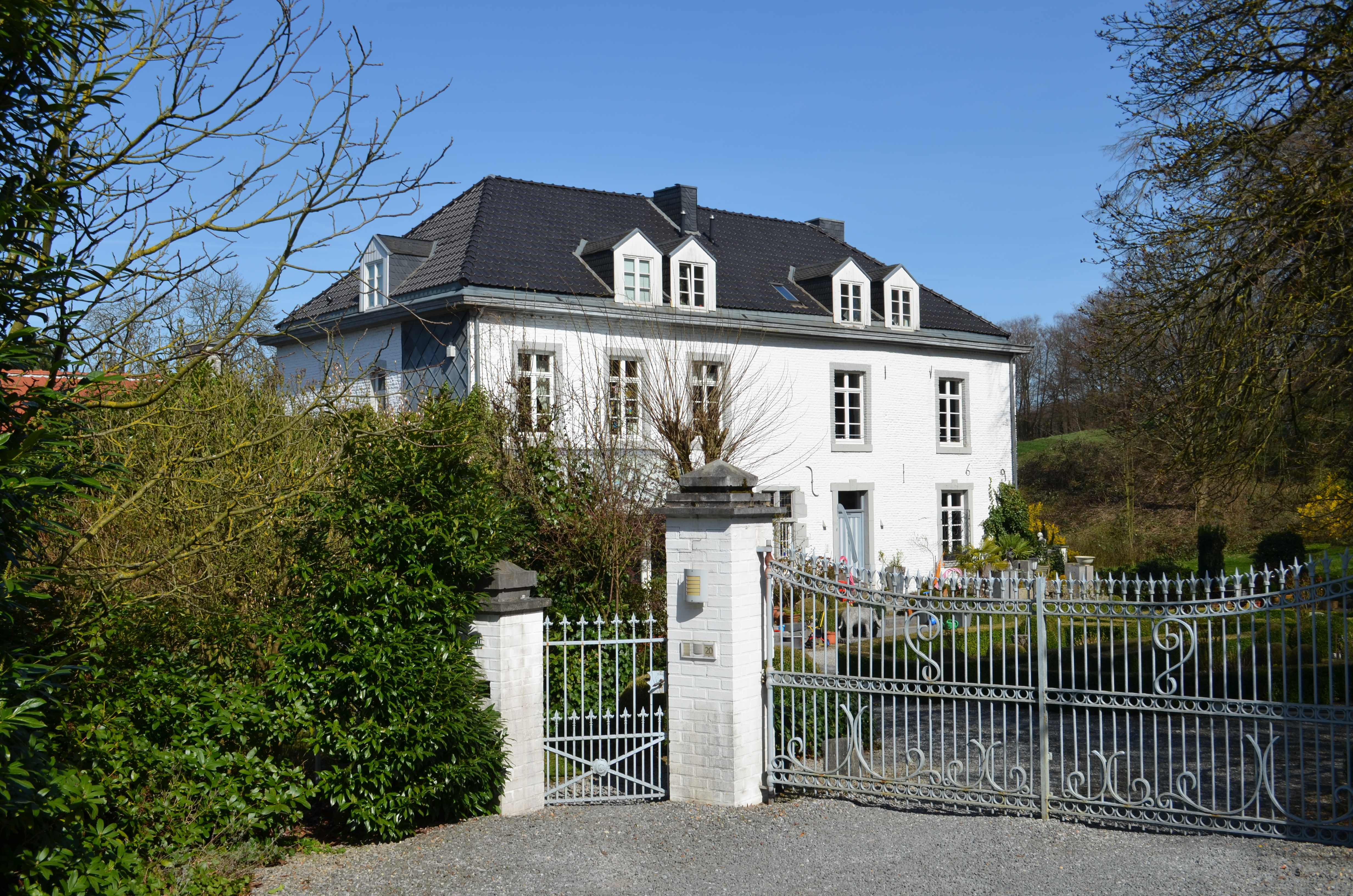 Das Herrenhaus des Colynshofs in Aachen